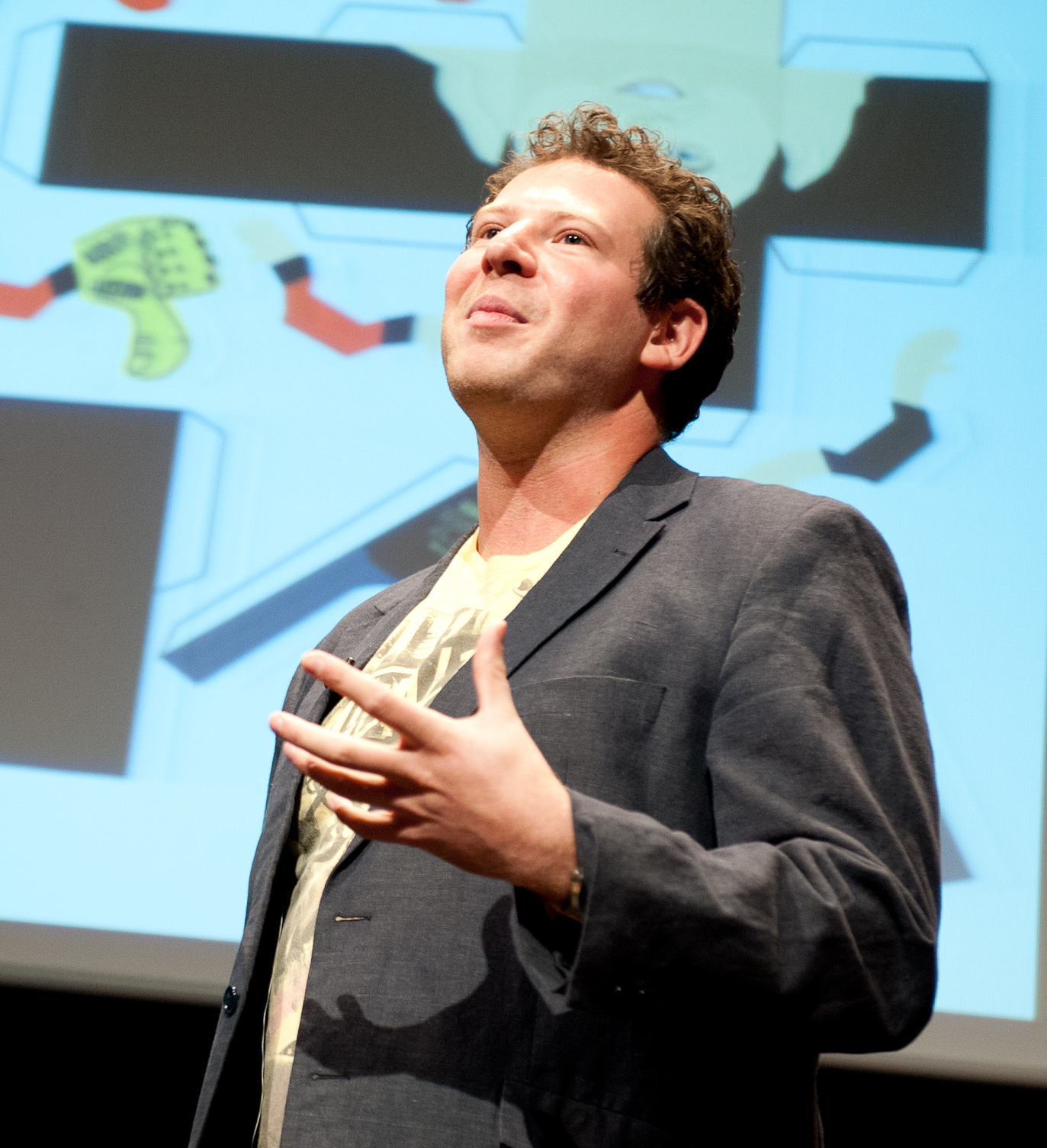 Photo